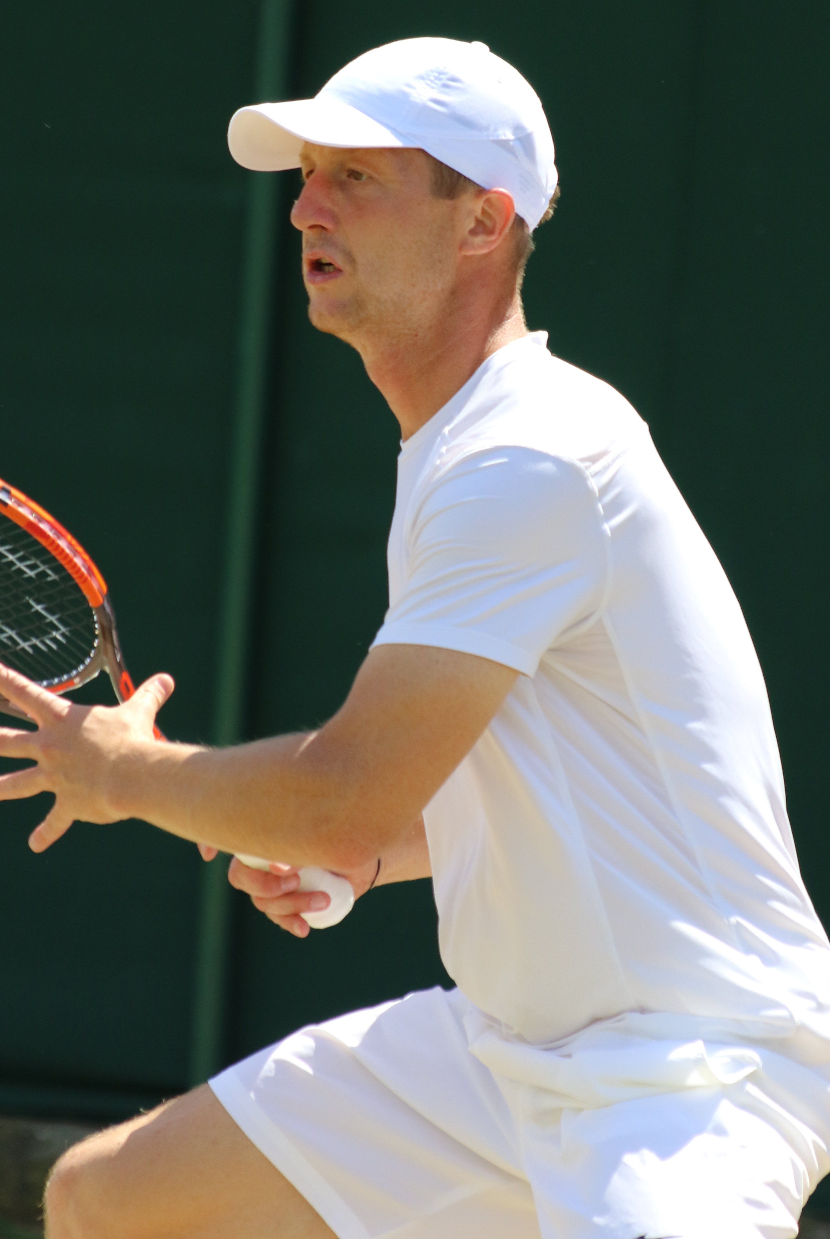 Sancic WM17 (11)